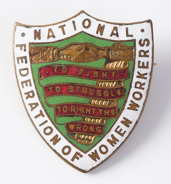 Op een rommelmarkt werd een foto van koning Albert I gekocht. De verkoper wist niet dat dit een beeltenis van Koning Albert I was. Er wordt veel belang gehecht aan deze foto omdat vermoed wordt dat dit een originele foto is, die mogelijk in Engeland werd opgenomen. Het originele aspect wordt ondersteund door de handtekening van de fotograaf op de passe partout (Engelsman Richard N. Spraight, gefotografeerd in Engeland). De grootvader (langs vaderskant) van de geïnterviewde is Jozef Petré. Jozef is na de val van Antwerpen naar Engeland gevlucht in 1914 samen met zijn vrouw en hun eerste zoon Emile Petré die toen 3 jaar oud was. Zij hebben in Engeland gewerkt in de oorlogsindustrie. Zij woonden daar met andere Belgen in kampen. Albert Petré (vader van Armand Petré) werd in Engeland geboren in 1915 in Baildon (N-Engeland) als tweede zoon in het gezin. De familie is teruggekeerd naar België tijdens het begin van de jaren twintig. Zij zijn op de Elsdonck te Wilrijk gaan wonen. Een insigne van het wijkcomité van Elsdonck is bij de meegebrachte items terug te vinden. Naast het verhaal van grootvader brengt Armand Petré een groot rood fotoboek mee uit 1933-1934. Soldaten konden het Gulden boek der Vuurkaart aanschaffen tegen 285 frank. Grootvader Paulus langs moederskant is oorloginvalide met een houten been. Nochtans komt hij niet voor in dit boek, alhoewel hij minstens 9 maanden aan het front heeft gestreden. Het Gulden boek der Vuurkaart draagt op de eerste pagina een foto en de naam van Francois Meulemans. Interessant is dat samen met dit Gulden Boek ook andere oorlogsdocumenten van deze persoon mee verzameld zijn nl. Carte de Pécule op naam van Francois Meulemans, Livret de Mobilisation van Francois Meulemans, Carnet de notes de sous-officier Meulemans (Francois, Louis, Charles)engagé en 1915.